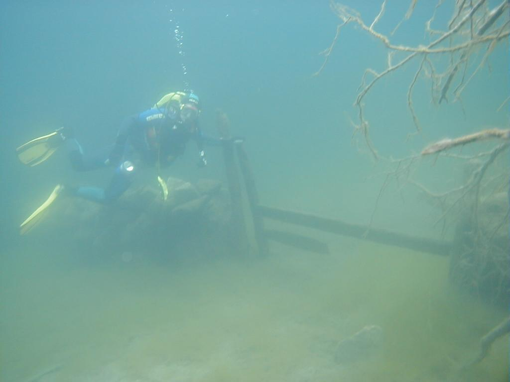 Undervannsbilde fra Lyngnstøylvatnet. Porten og det gamle steingjerdet med dykker. Fotograf: Johnny Ljunggren